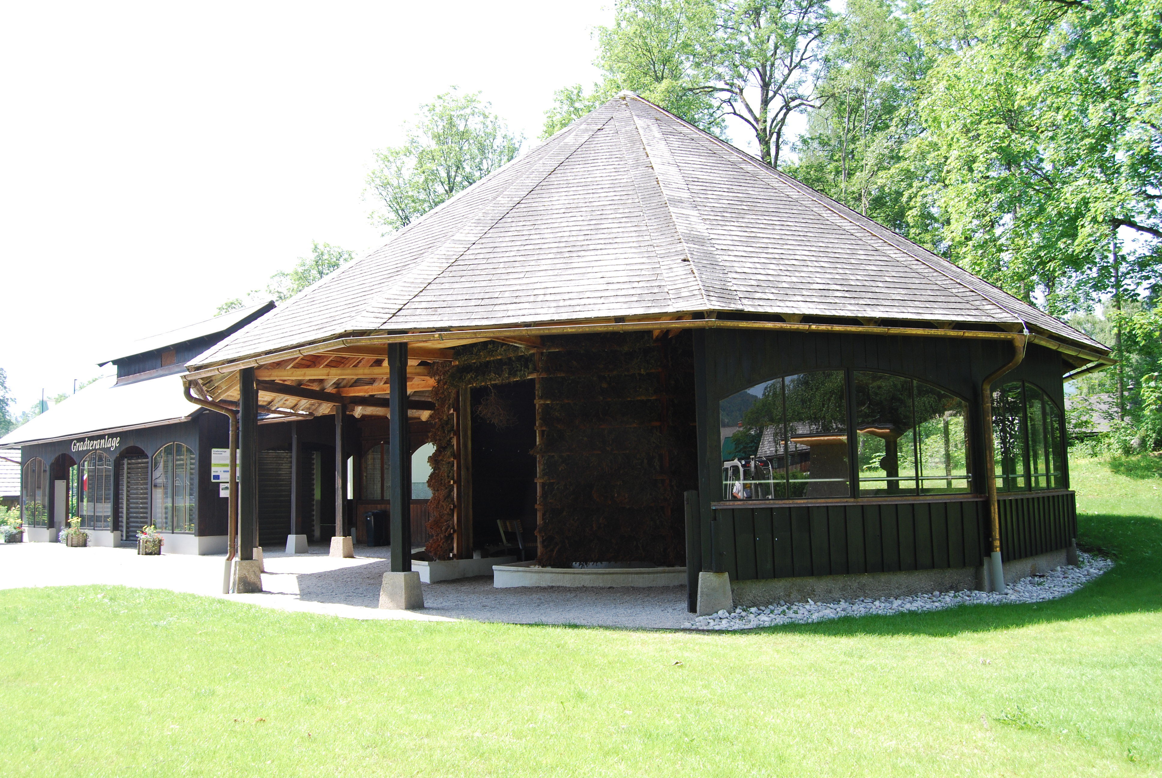 Alte Gradieranstalt, Altaussee, Steiermark